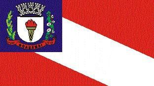 Bandeira-guanambi.jpg